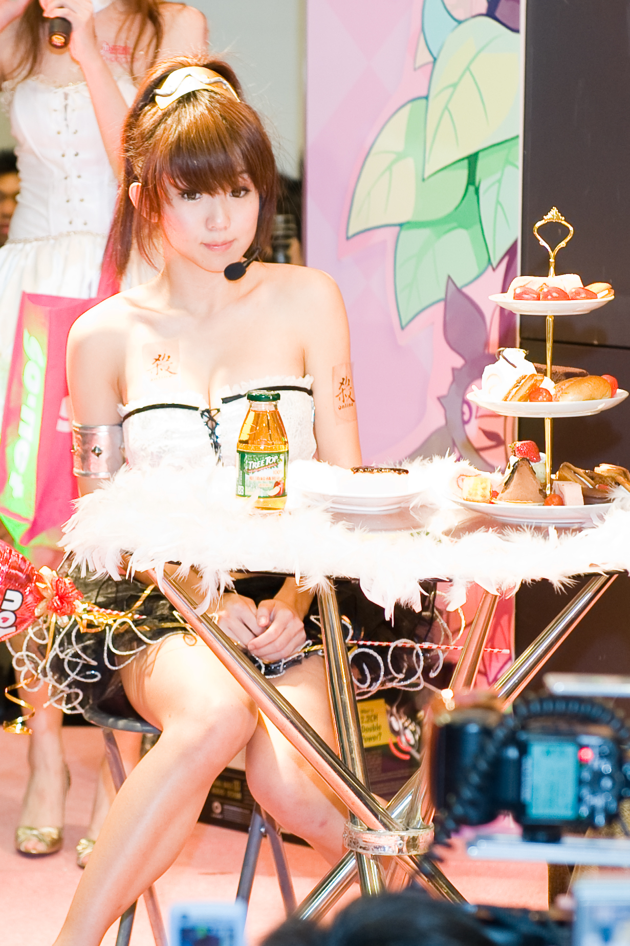 中文（台灣）: 郭書瑤在2009年2月14日出席台北國際電玩展三十數位科技攤位，代言線上遊戲《殺online》。Bân-lâm-gú: Kueh Su-iâu tsāi 2009-nî 2-gue̍h 14-ji̍t tshut-si̍k Tâi-pak Tiān-guán-tián.